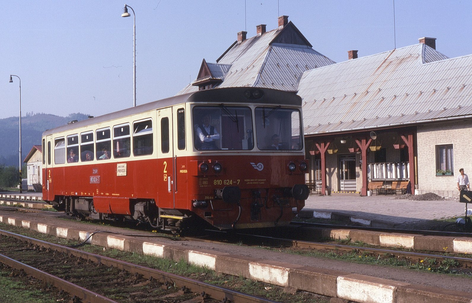 Motorový vůz 810.624 Železnic Slovenské republiky, Horná Štubňa